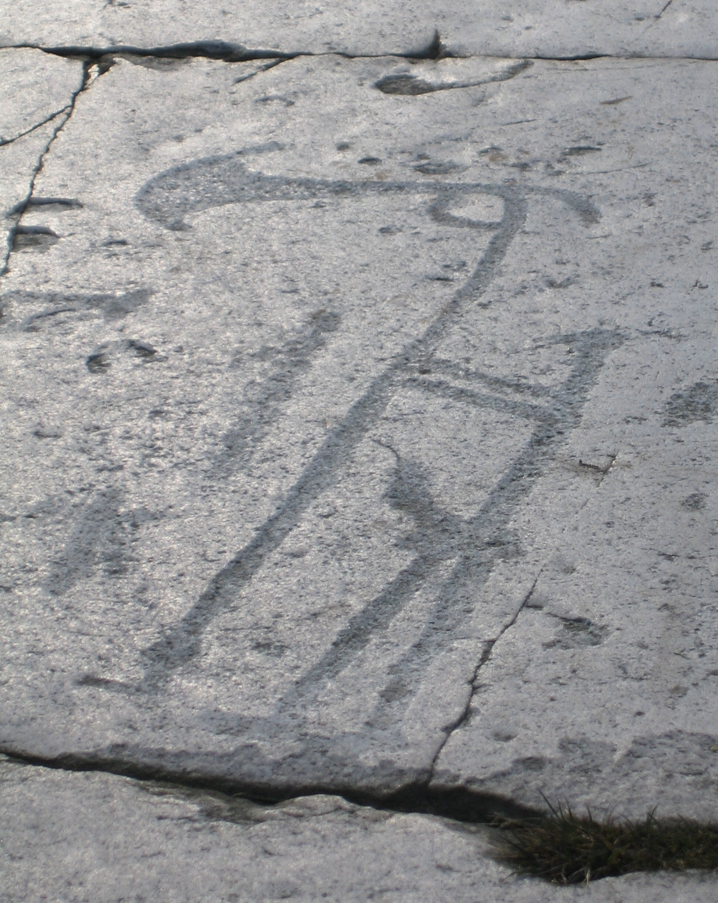 Petroglyph in Simrislund, Sweden